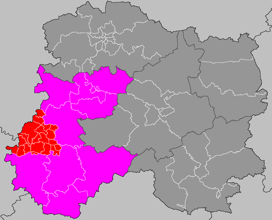 Localisation du canton de Montmirail, Marne